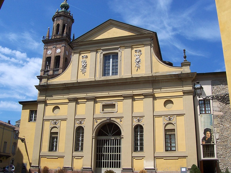 Parma - Chiesa di S. Paolo